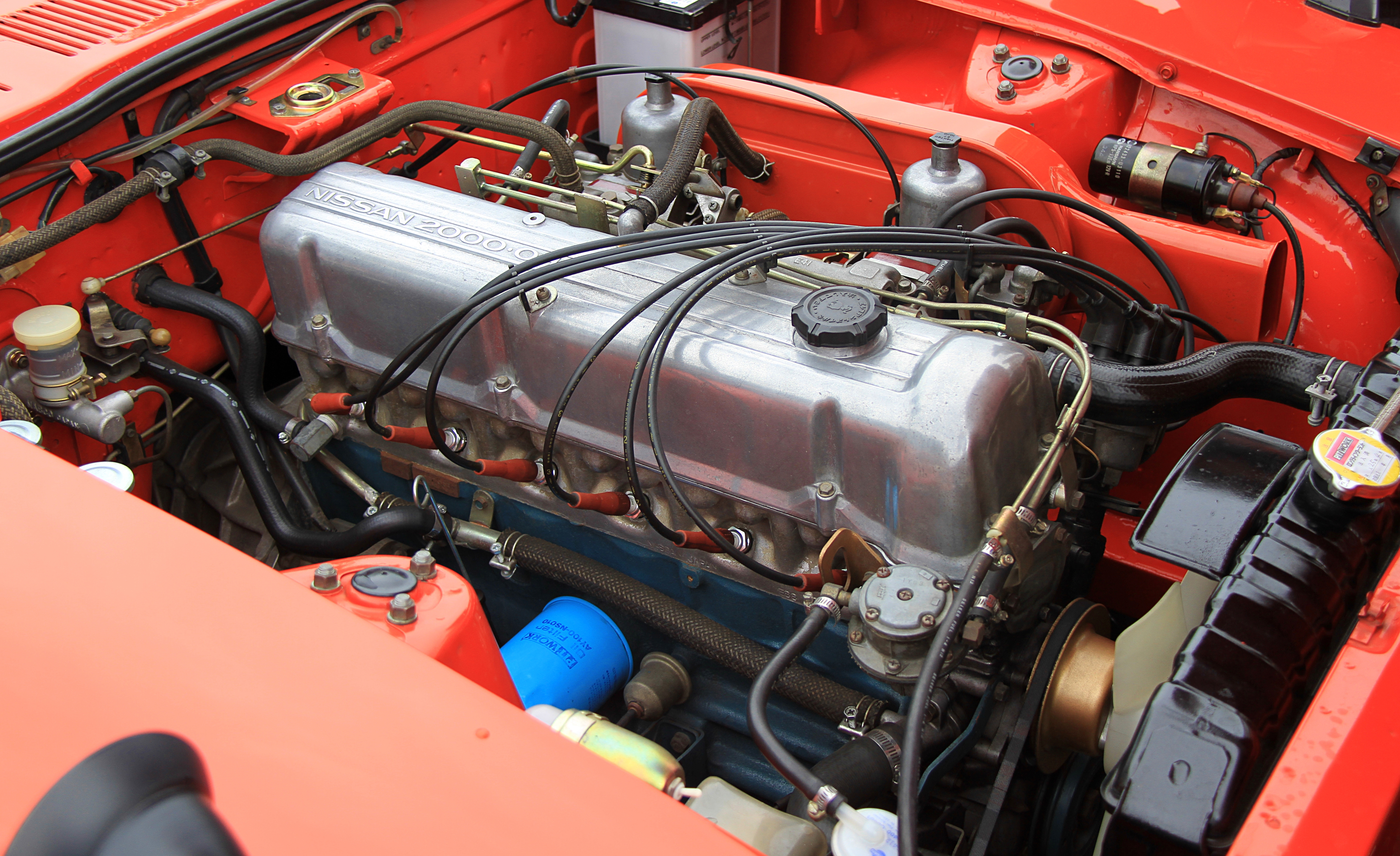 Nissan L20